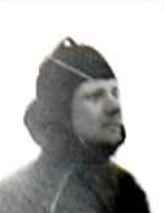 Pfitzner Sándor (1880–1910) magyar repülőgép-tervező.